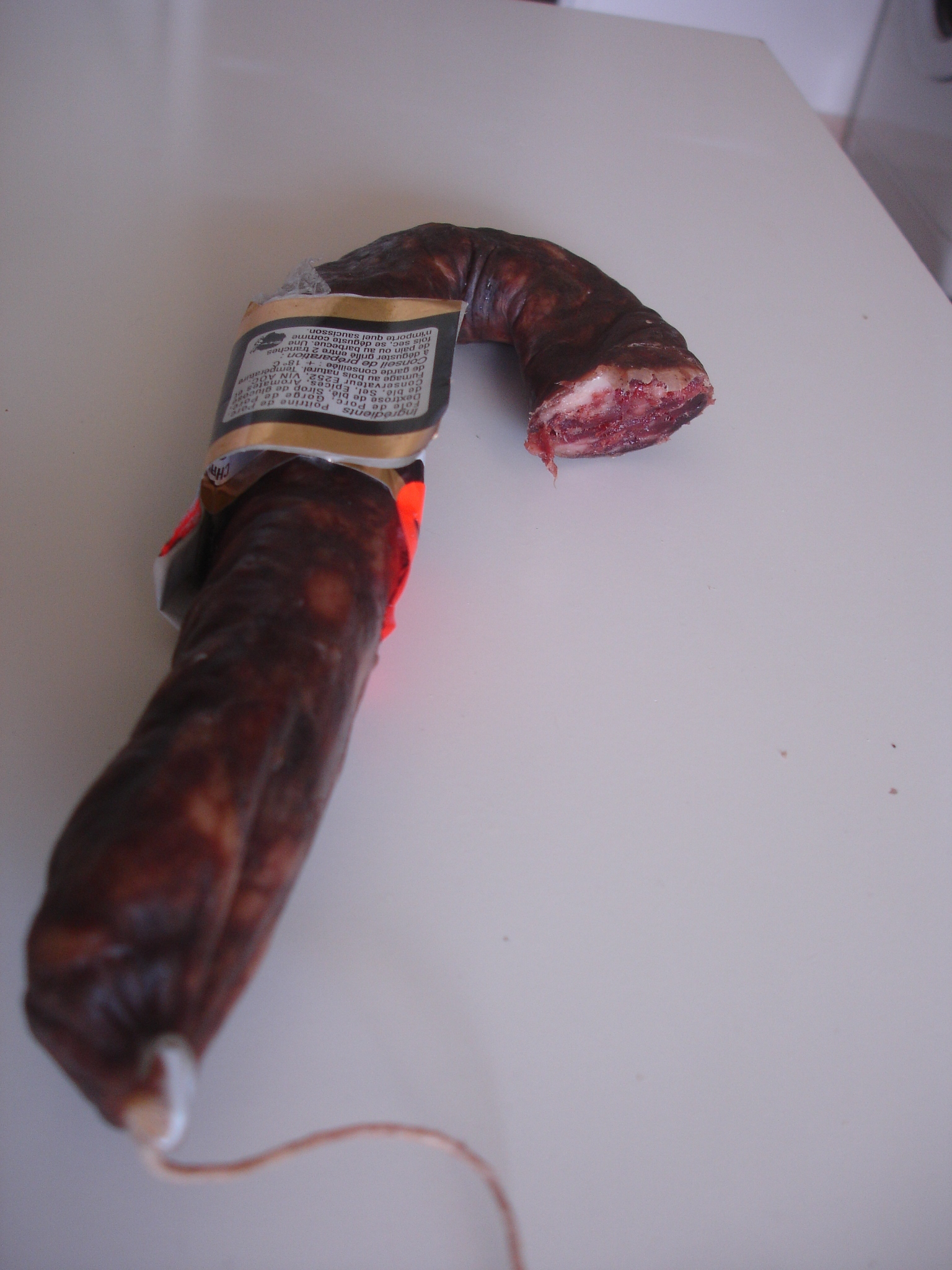 Figatelle, charcuterie corse